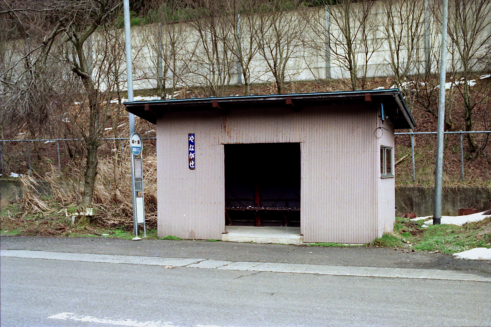 柳ヶ瀬バス停 滋賀県長浜市余呉町柳ケ瀬